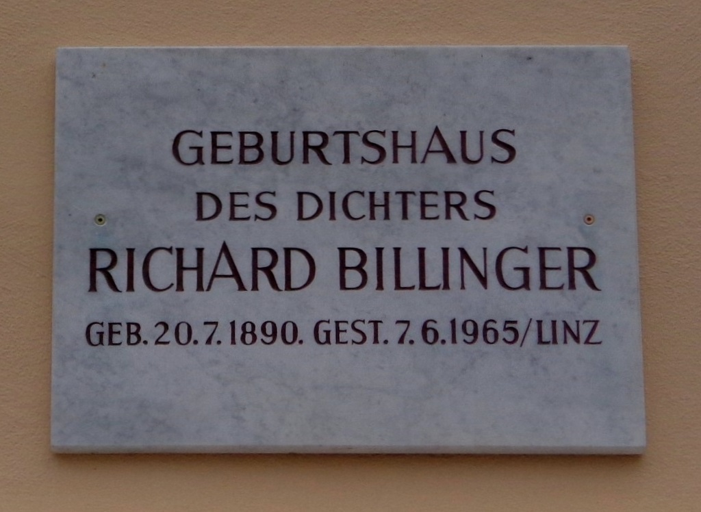 Tafel am Geburtshaus des Dichters Richard Billinger in St Marienkirchen bei Schärding